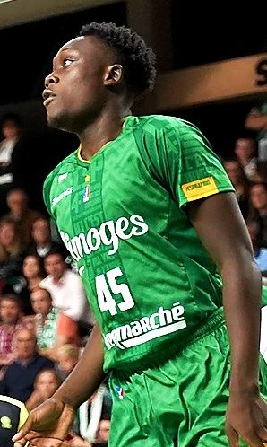 ODN02088